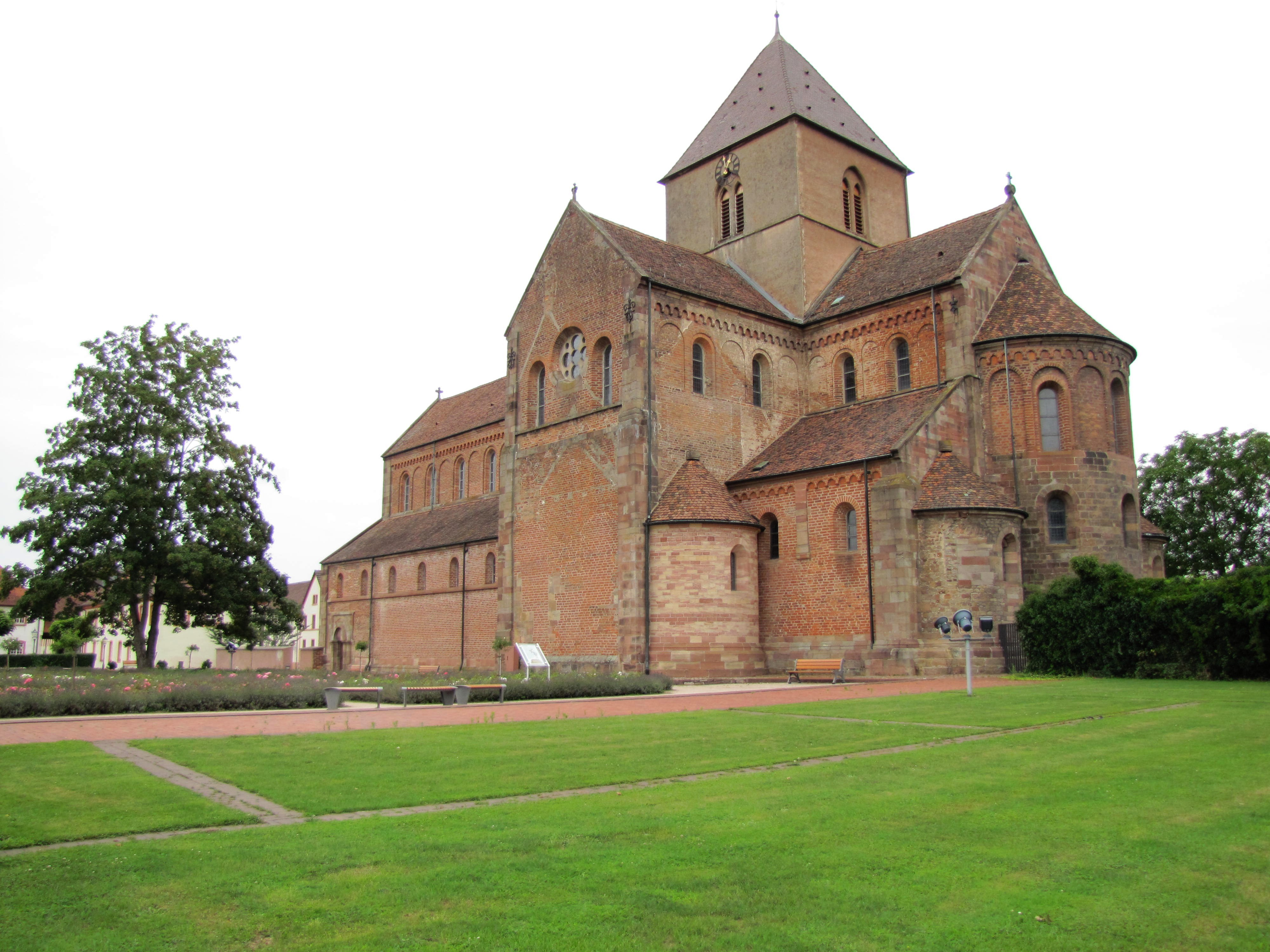 Baden-Württemberg, Rheinmünster, Klosterkirche Schwarzach, Ansicht von Süd-Osten